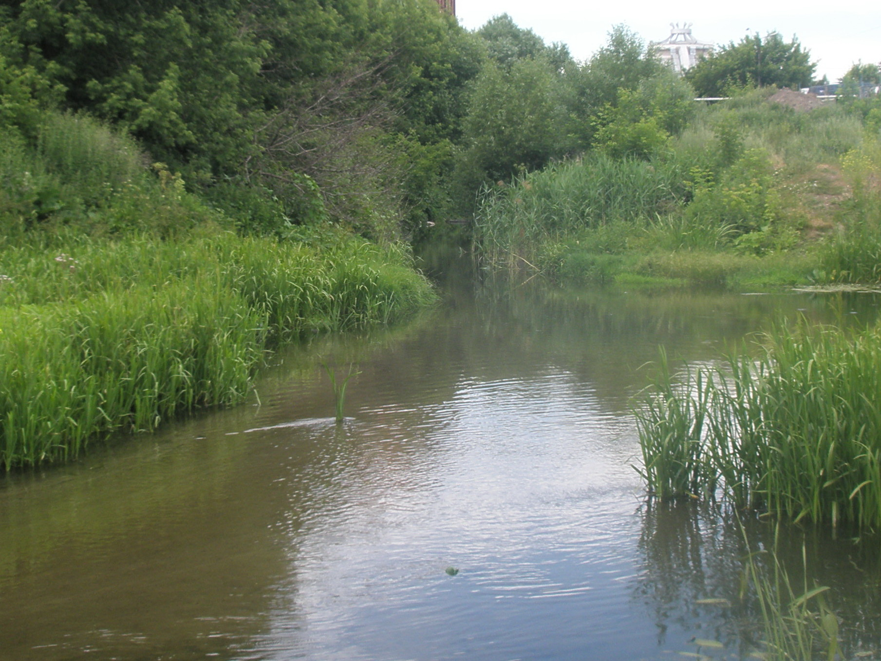 Устье реки Кур